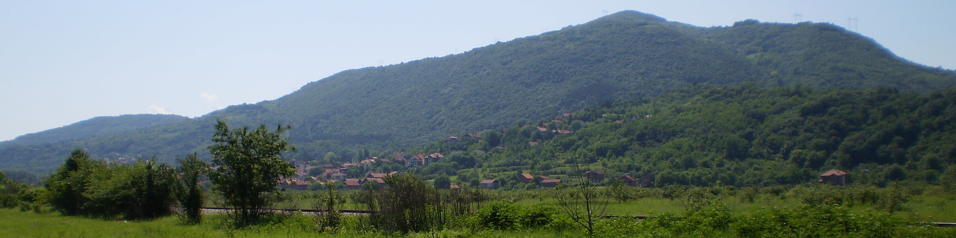 Brdo Koritnjak sa Niškom Banjom u njenom podnožju. Autor dr Milorad Dimić, 3.6.2012